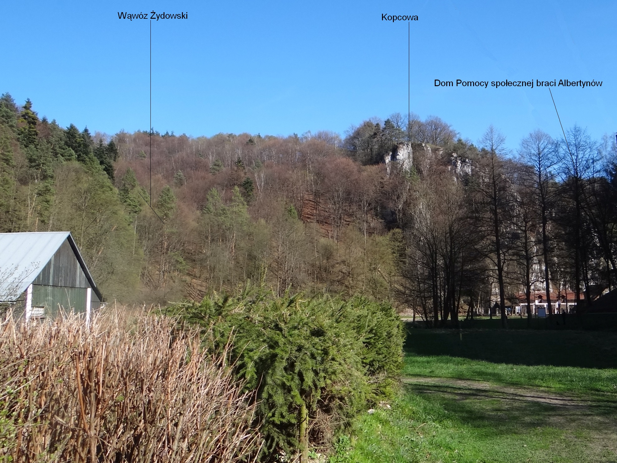 Ojcowski Park Narodowy